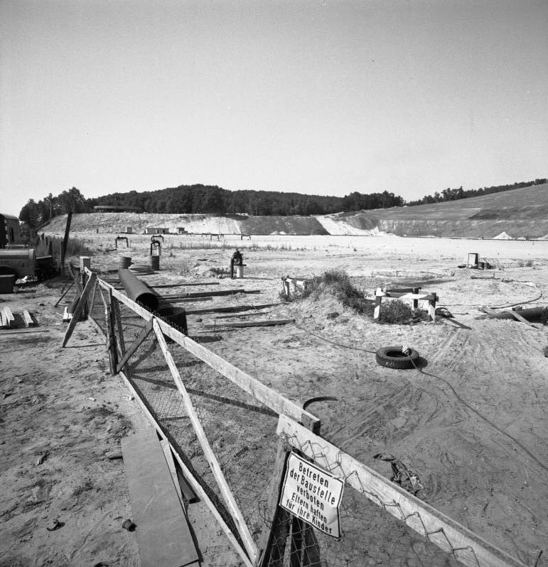 Baustelle für das Kernkraftwerk Krümel bei Geesthacht/Elbe